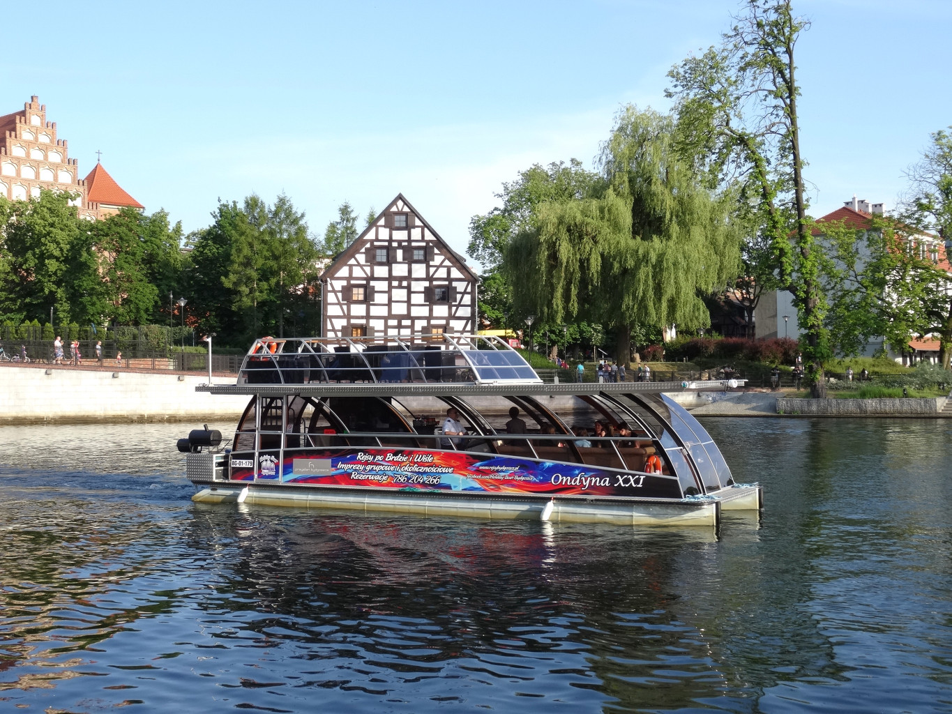 Statek wycieczkowy Ondyna XXI na Brdzie w Bydgoszczy